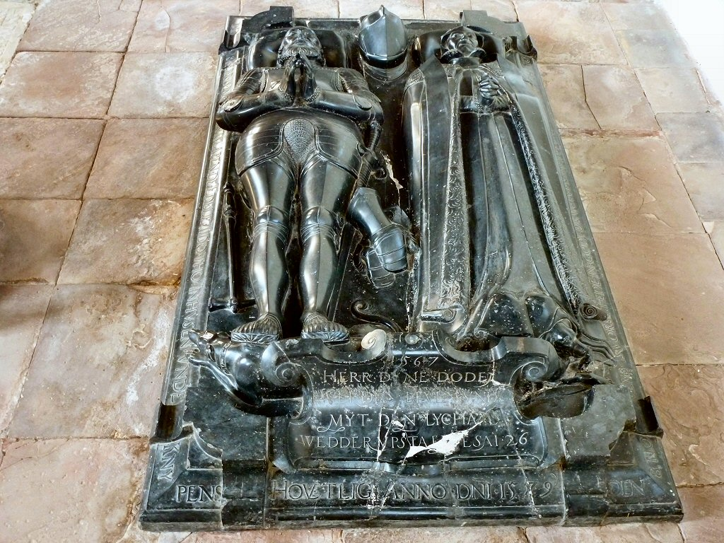 Grabmal für den Häuptling Tido von In- und Kniphausen († 18. Februar 1565) und seiner Frau Eva von Renneberg († 1579) in der evangelisch-reformierten Accumer Kirche in Accum, Stadt Schortens, Landkreis Friesland